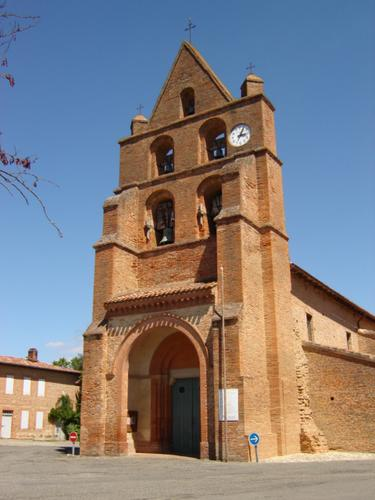 Église de Fontenilles (31) (Source : Photo personnelle)